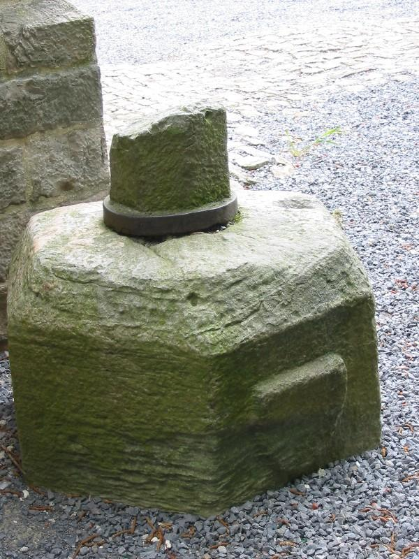 Pilier de l'église Saint-Vaasr